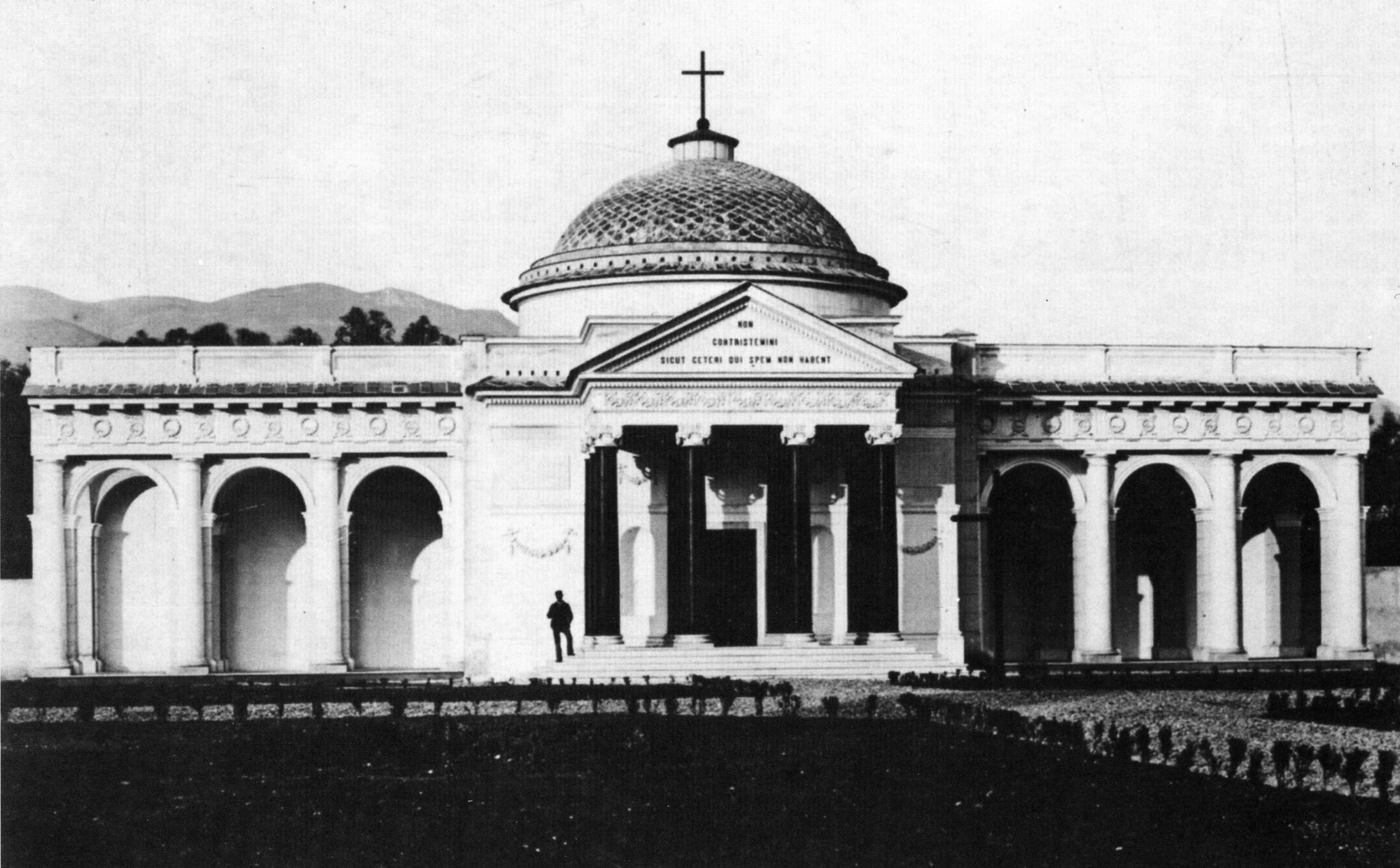 Questa foto rappresenta la prima edificazione del cimitero di Leca d'Albenga nel 1893 con il progettista Revello il giorno dell'inaugurazione avvenuta nei primi mesi dello stesso anno. L'orma architettonica è quella del Pantheon, usata anche nel più vicino e famoso cimitero di Staglieno. Sono presenti solo 6 arcate laterali nella prima edificazione, mentre ne verranno realizzate altre in seguito.